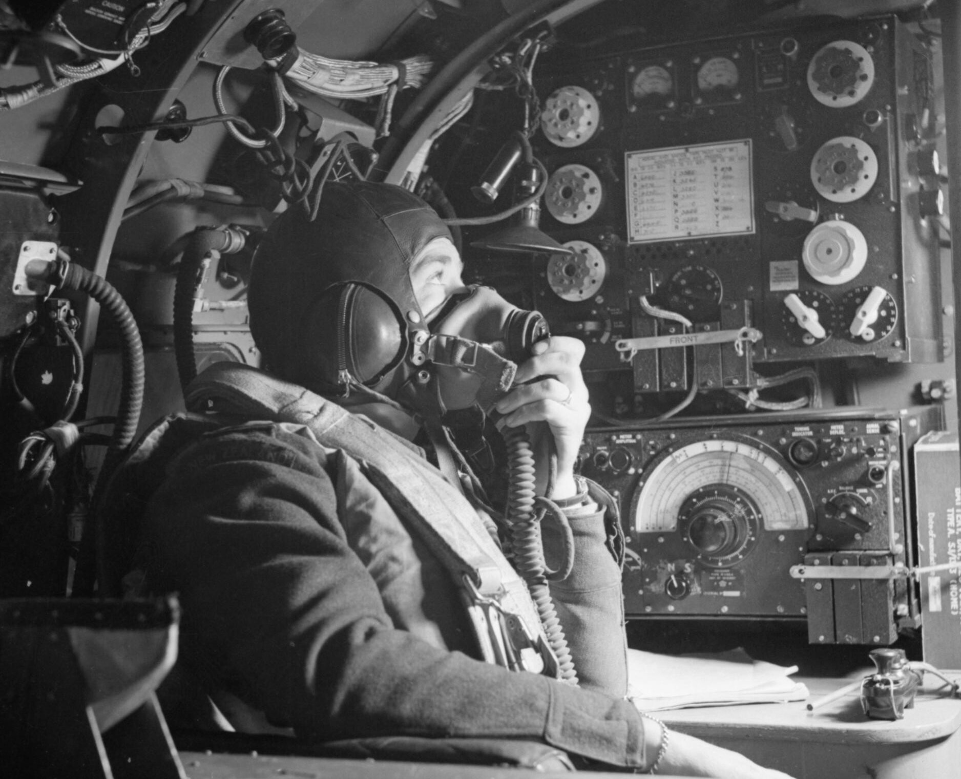 このアブロ ランカスターは、初の双曲線航法であるGee、DMEの元祖であるOboe、なども装備していた。